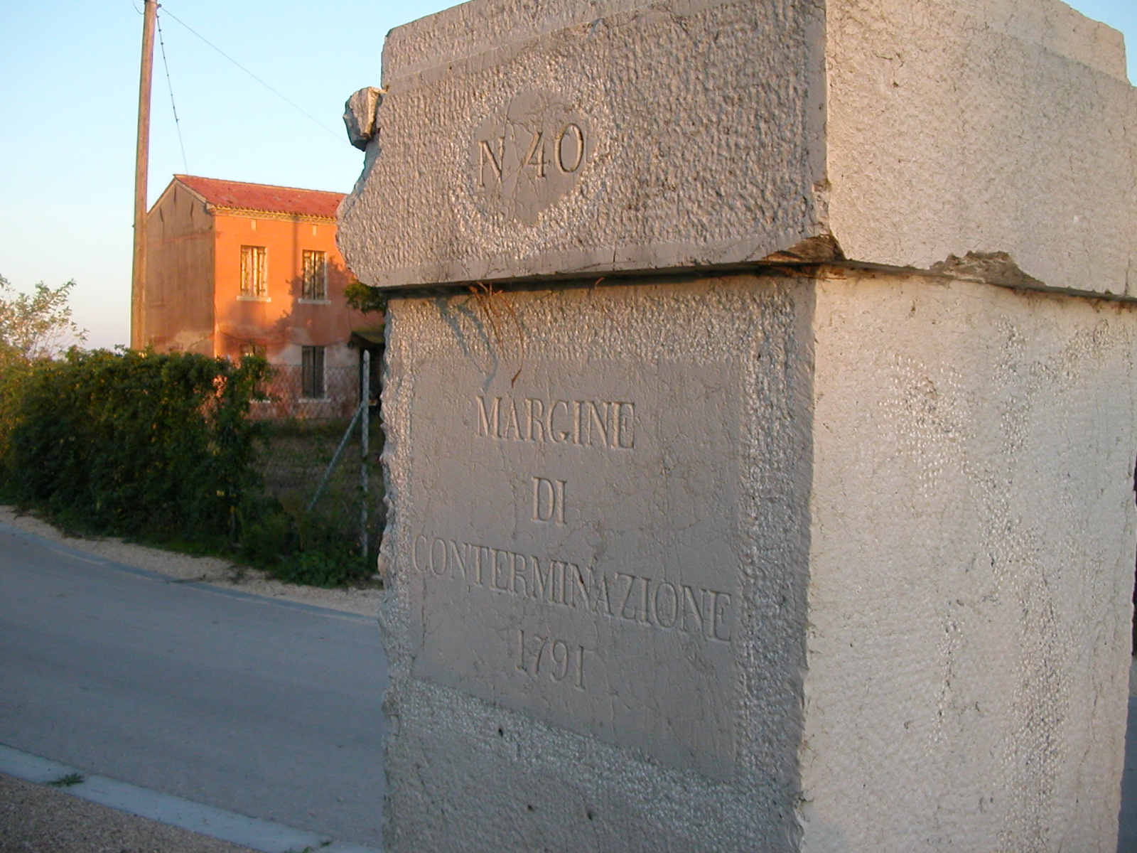 Isola Sant'Erasmo (Venezia) - Cippo di conterminazione lagunare n.40.